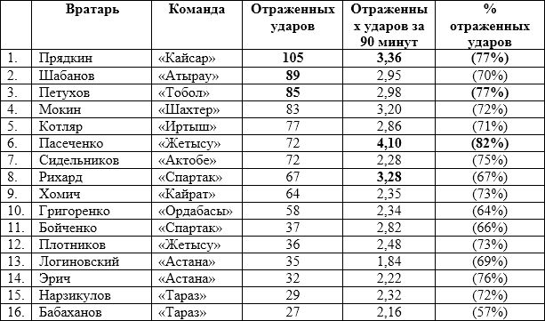 статистика вратарей КПЛ за сезон 2014.